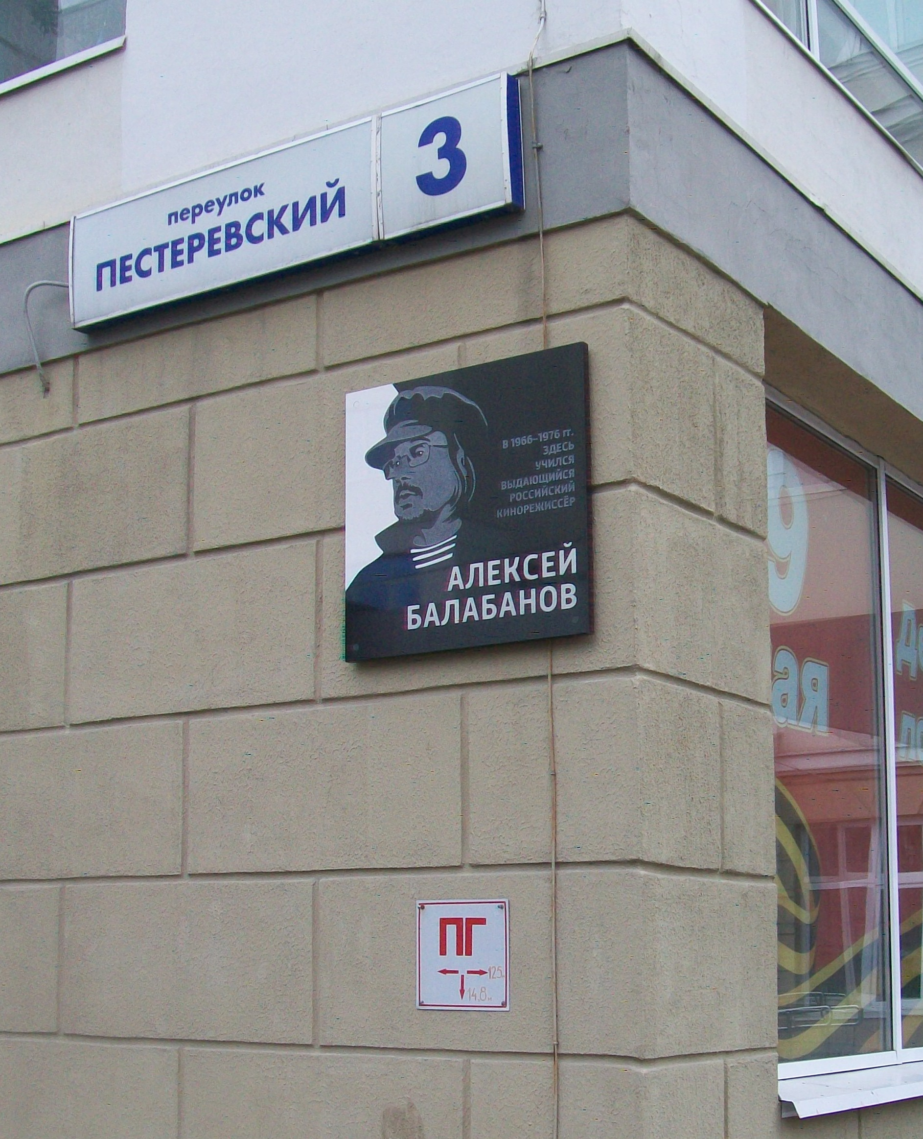 Мемориальная доска в память Алексея Балабанова на здании гимназии (тогда школы) № 2, где он учился в Свердловске (ныне Екатеринбург), май 2017 года